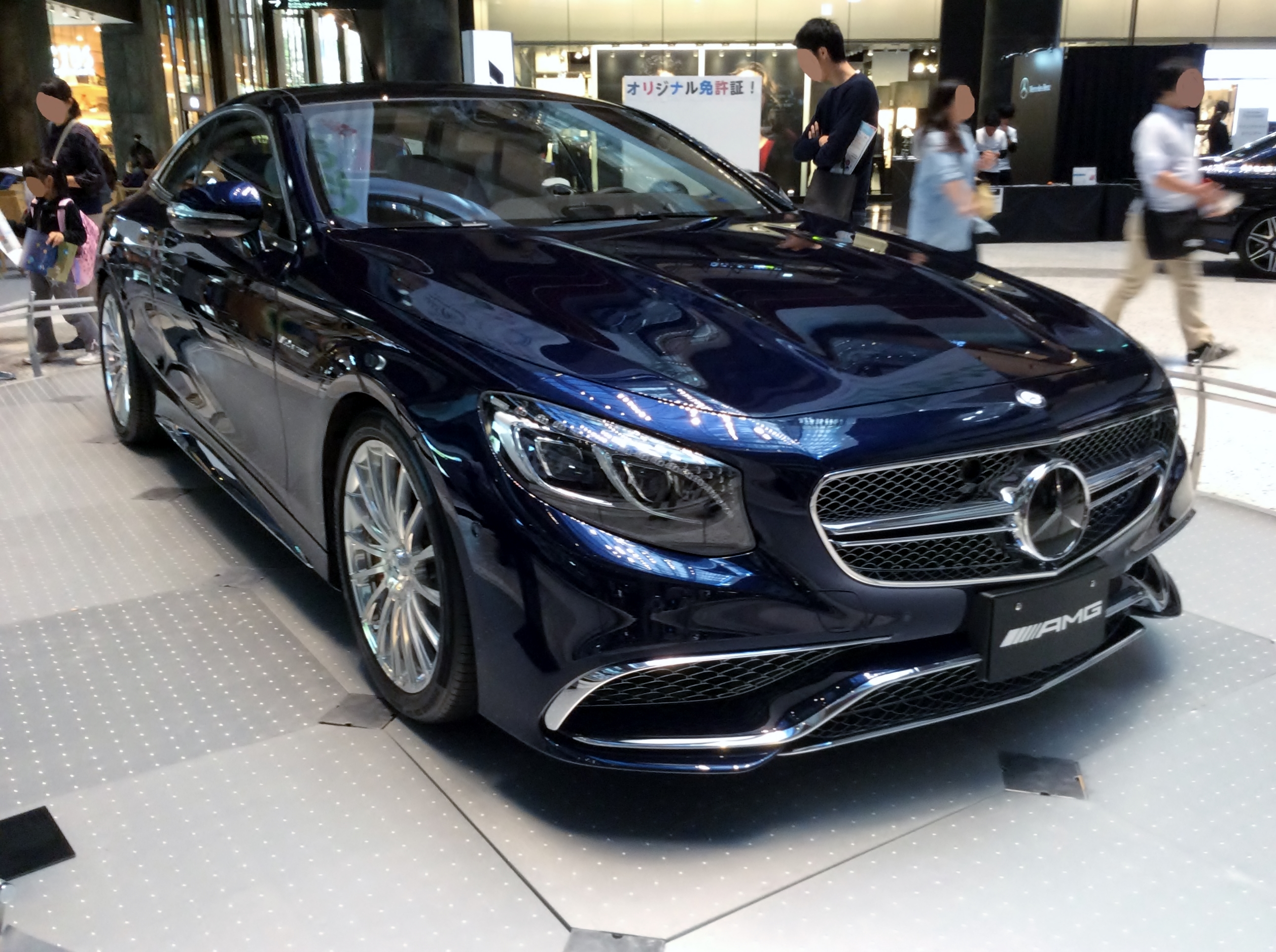 C217型メルセデス・ベンツS65 AMG クーペをフロントから撮影。